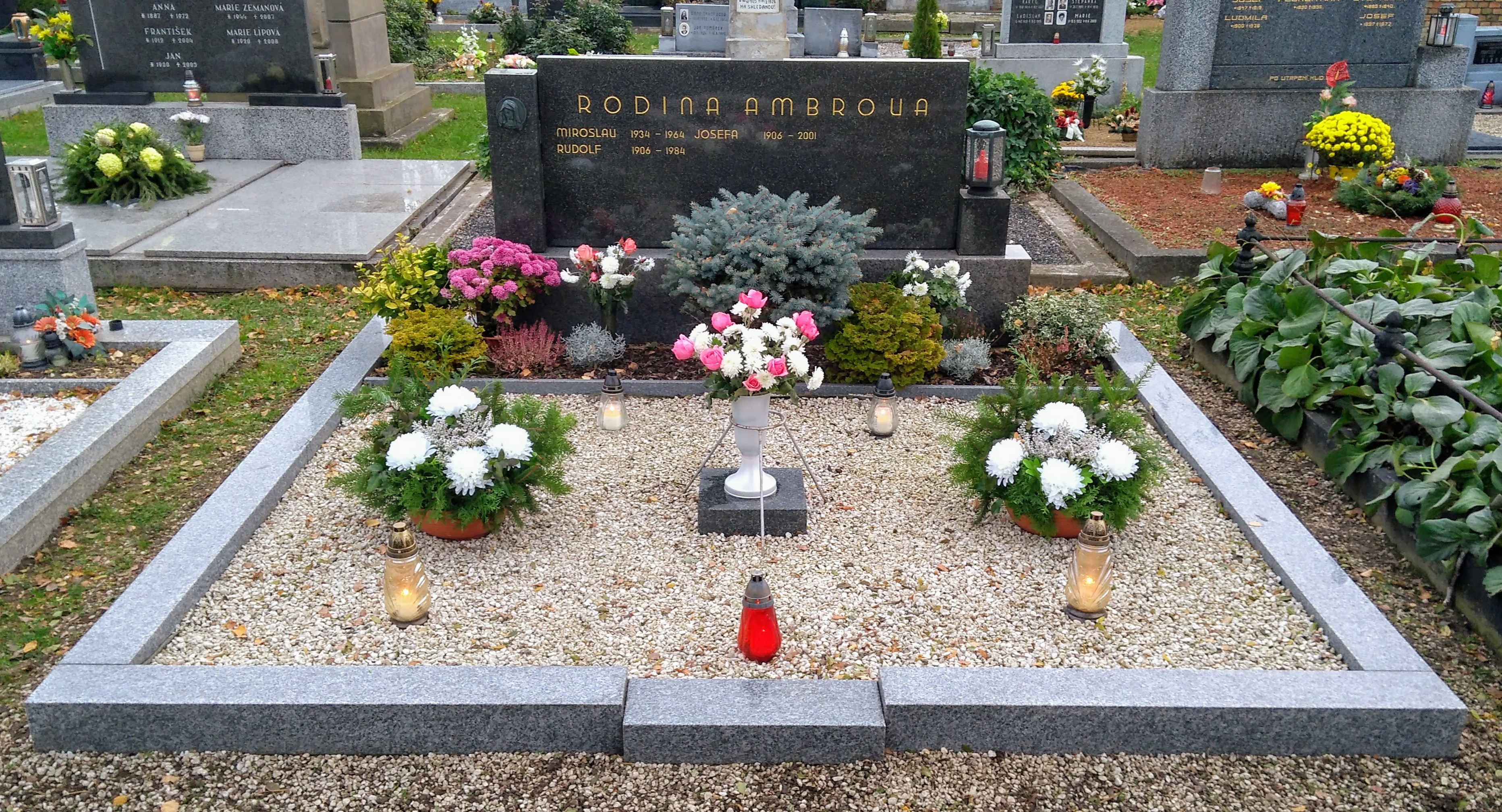 Rodinná hrobka hřbitov Bílany - Miroslav Ambro